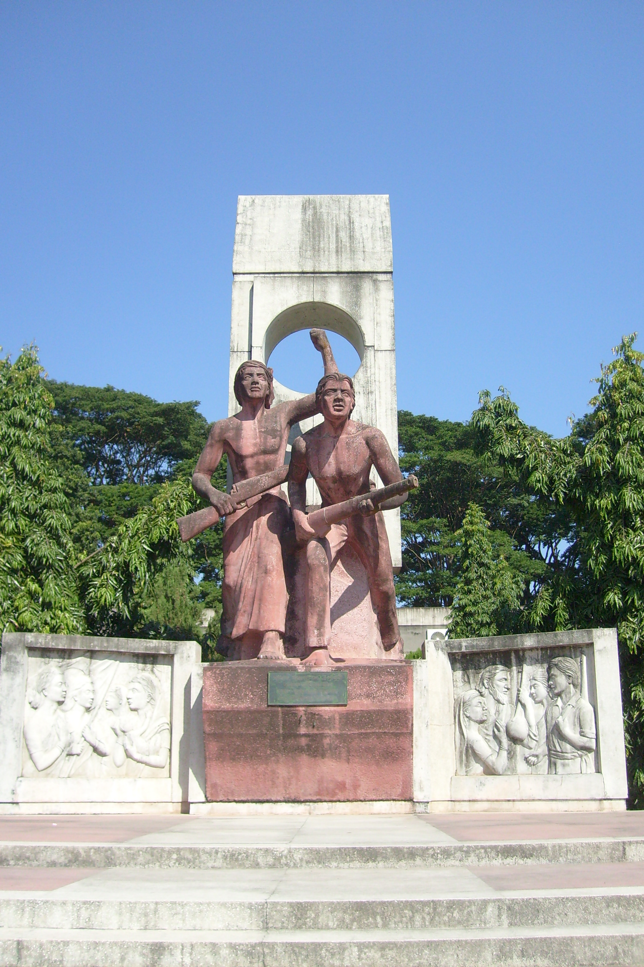 Sabash Bangladesh, Rajshahi University, Rajshahi, Bangladesh